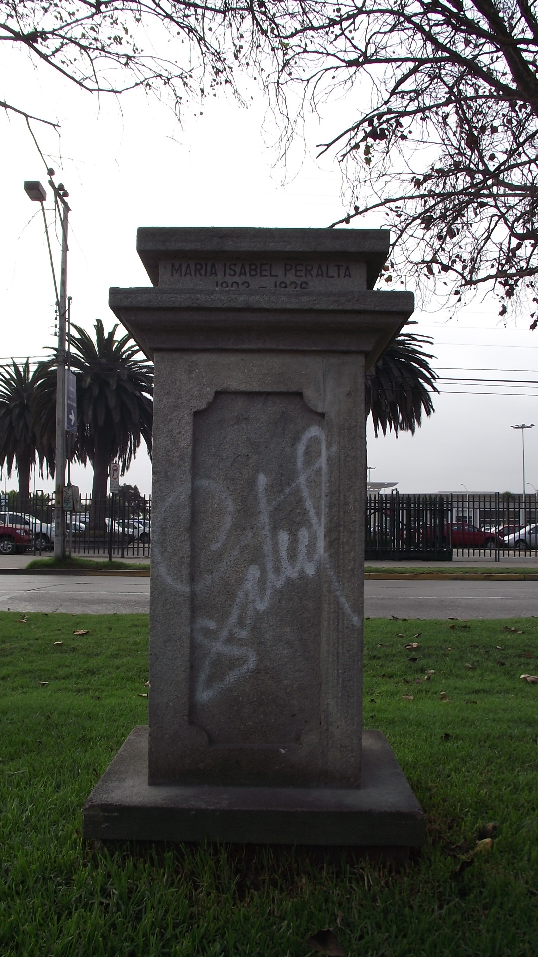 Aquí debería estar un busto de María Isabel Peralta